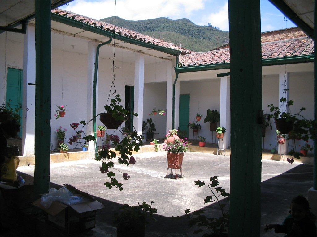 Patio tipico de las casas de habitación.